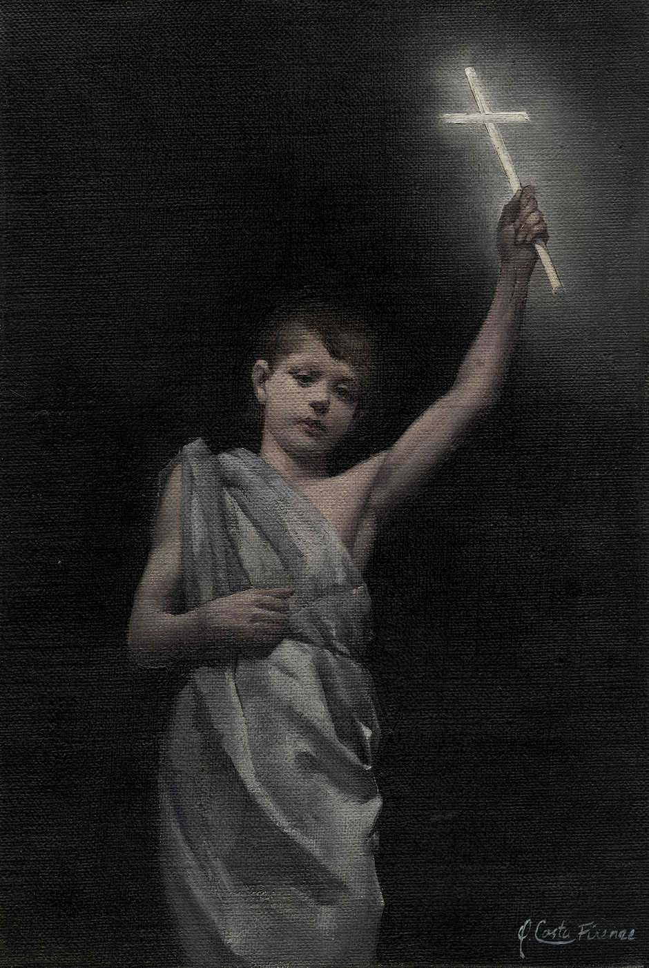 Oreste Costa (1851-1901), Firenze: Jugendlicher Johannes d. Täufer mit leuchtendem Kreuz in der erhobenen Hand